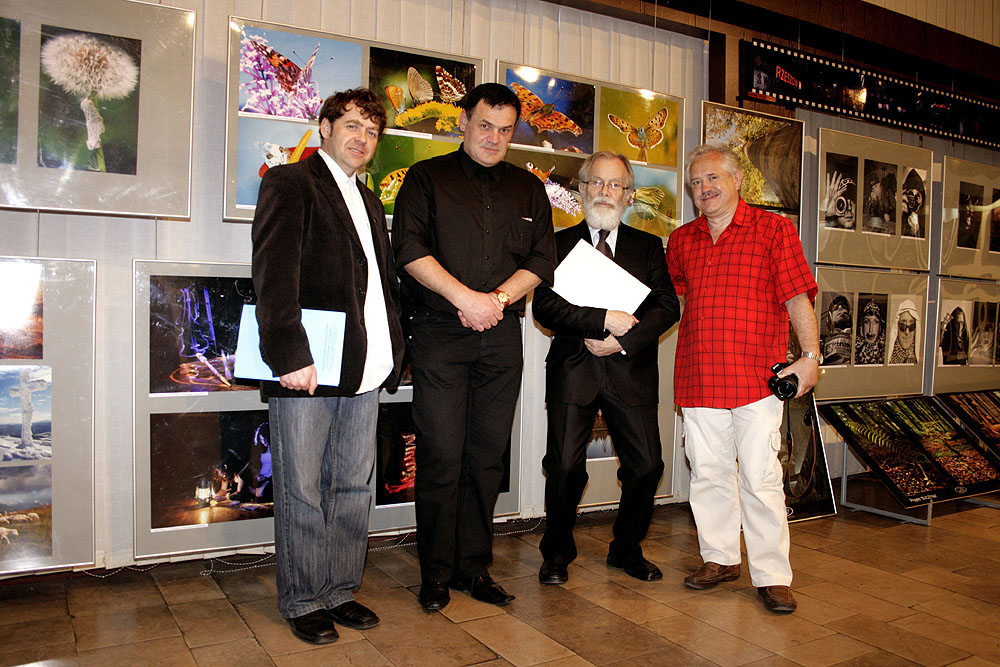 Udział TTF w "X Podkarpackich Konfrontacjach Fotograficznych" w Rzeszowie (10.05.2012) - od lewej: Adam Kus, Paweł Matyka, Jerzy Wygoda, Mirosław Mietła.